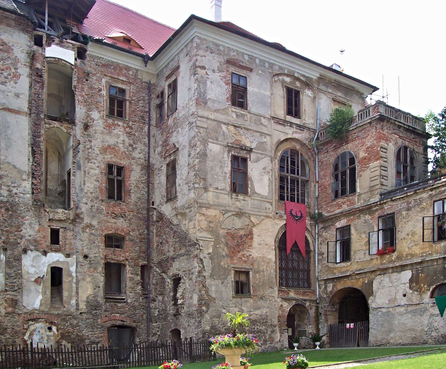 Zámek Jezeří, Jezeří čp. 1, Jezeří (Horní Jiřetín).